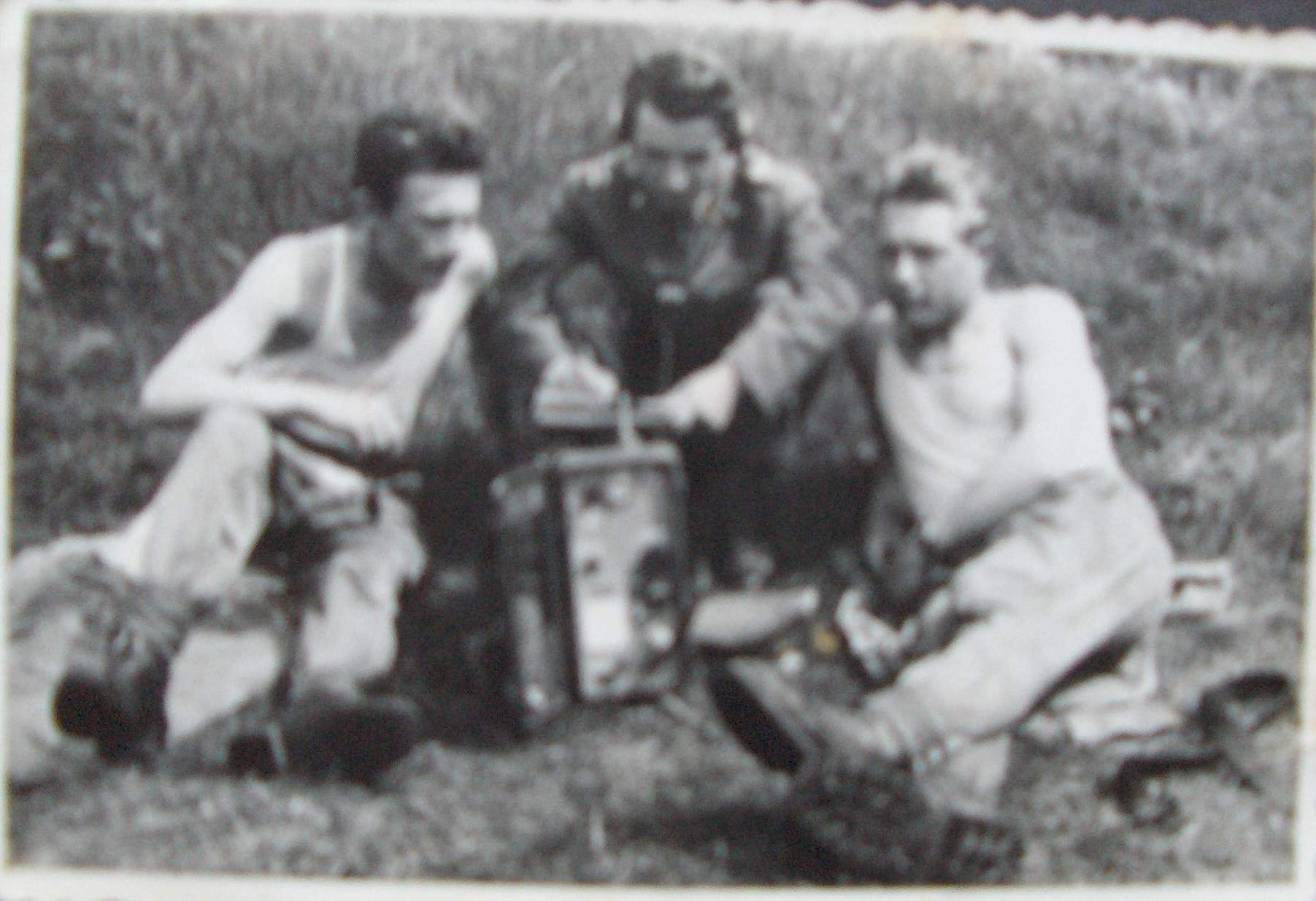 Żołnierze łączności podczas pracy